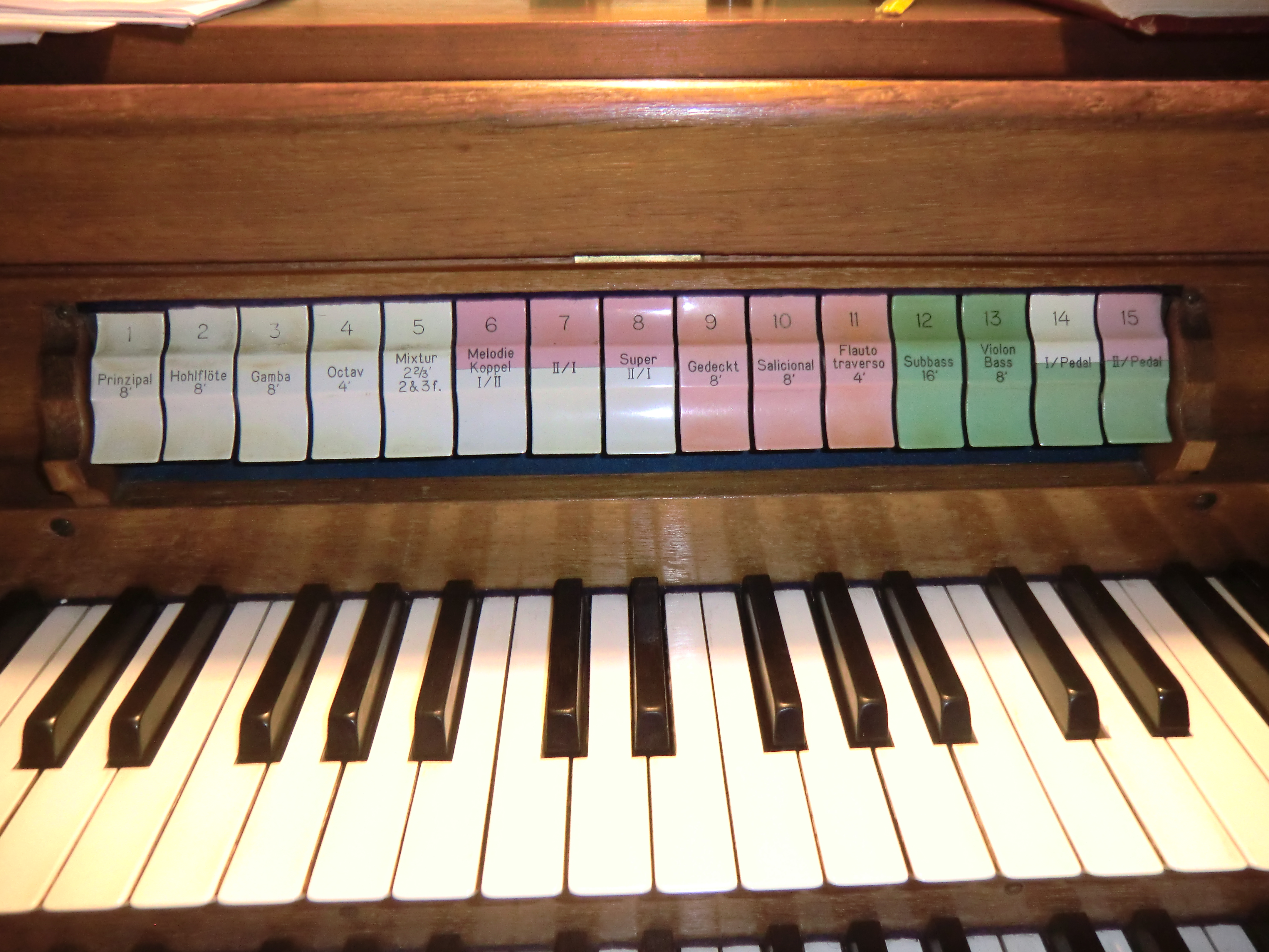 Horn-Orgel in Ransel (1912) - Register-Druckhebel (pneumatisch)